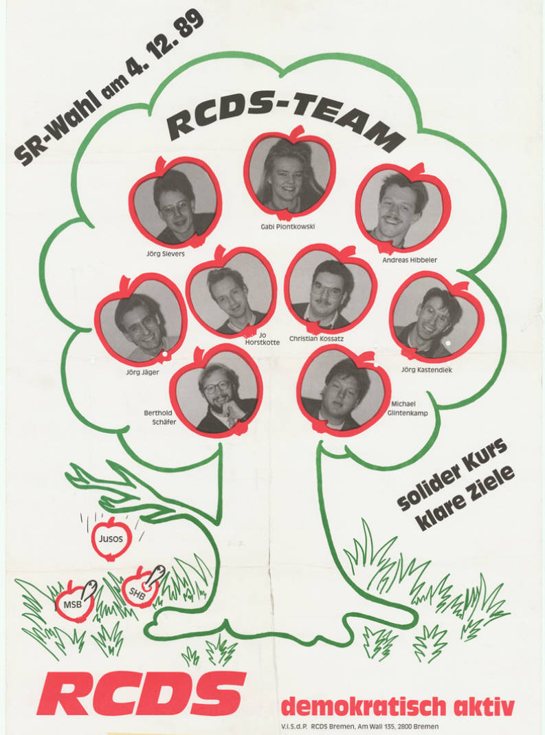 SR-Wahl am 4.12.1989 RCDS-Team Jörg Sievers, Jörg Jäger, Berthold Schäfer, Jo Horstkotte, Christian Kossatz, Michael Glintenkamp, Jörg Kastendiek, Andreas Hibbeler, Gabi Piontkowski solider Kurs klare Ziele RCDS demokratisch aktiv ... Abbildung: Baum, Früchte mit Porträtfotos bestückt Plakatart: Kandidaten-/Personenplakat mit Porträt Auftraggeber: V.i.S.d.P. RCDS Bremen Objekt-Signatur: 10-029 : 269 Bestand: Plakate von Hochschulgruppen (10-029) GliederungBestand10-18: Plakate von Hochschulgruppen (10-029) » RCDS Lizenz: KAS/ACDP 10-029 : 269 CC-BY-SA 3.0 DE